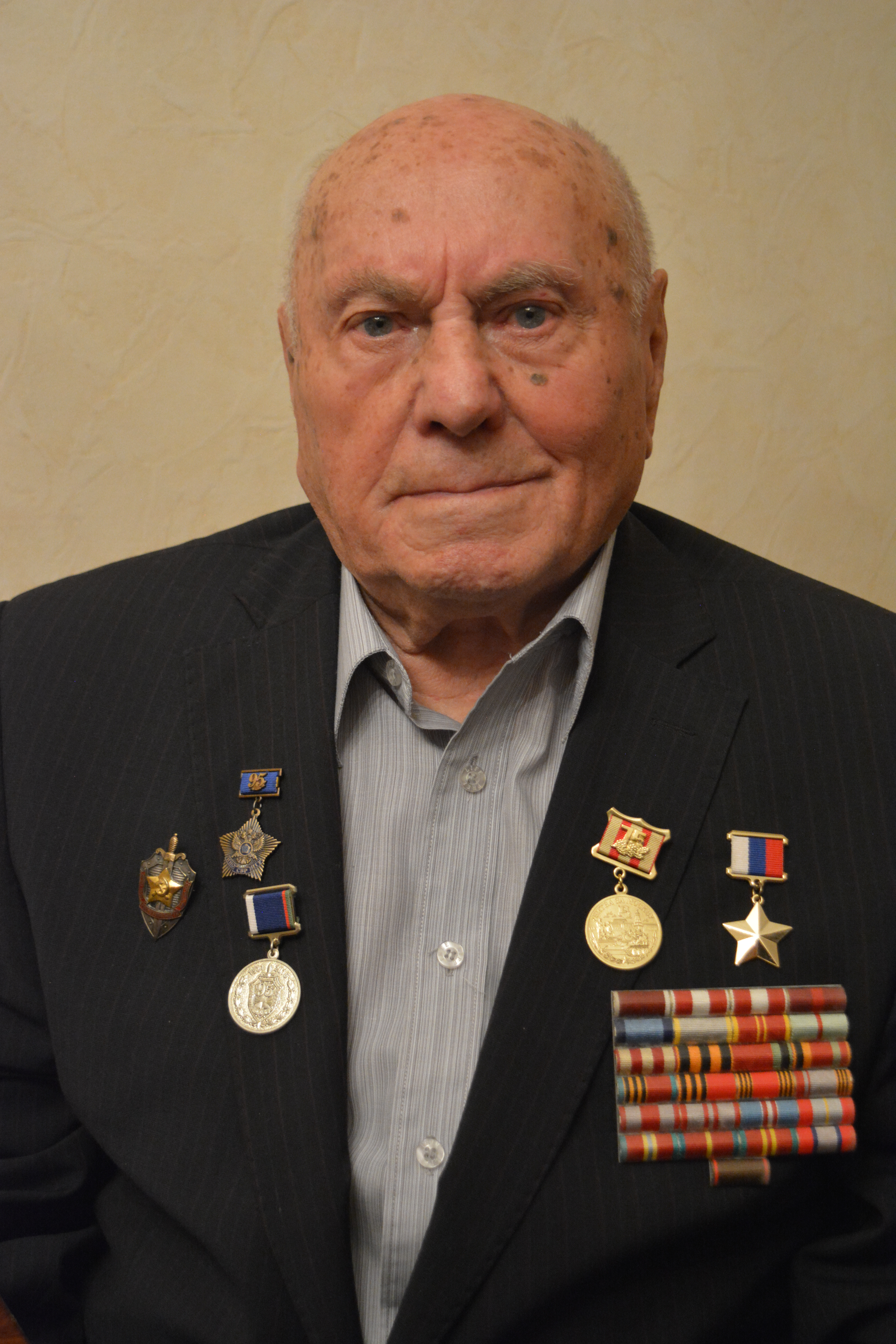 Герой Российской Федерации Алексей Николаевич Ботян. 2016 год.